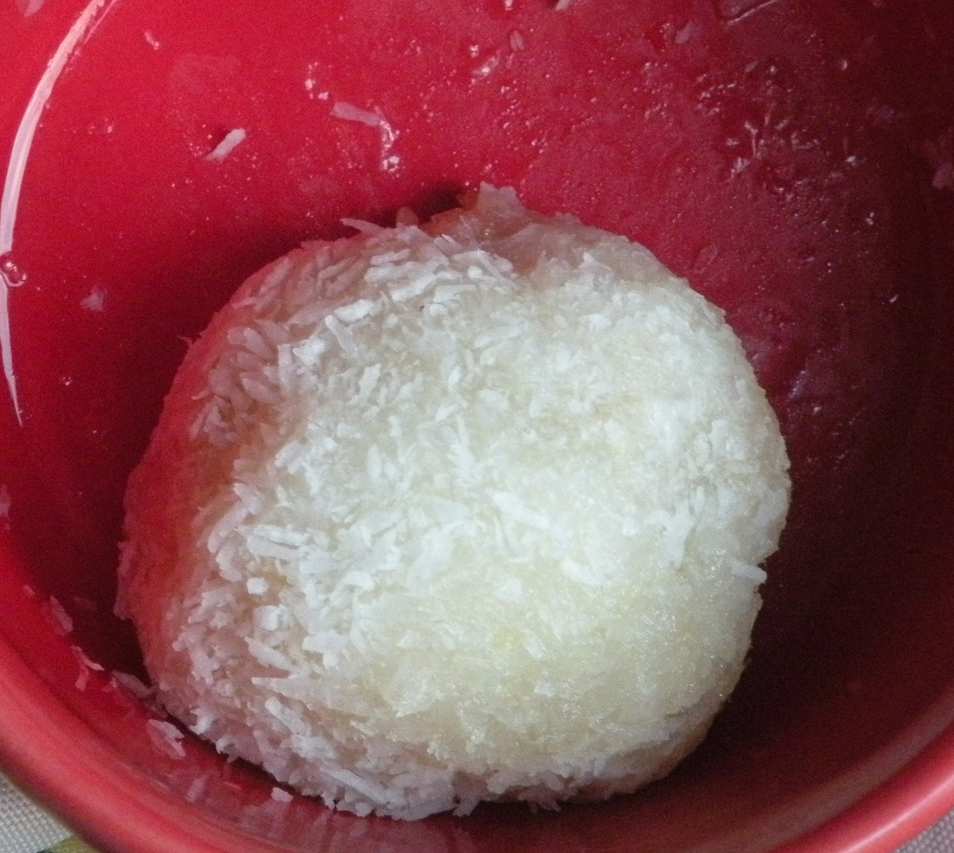 perle de coco